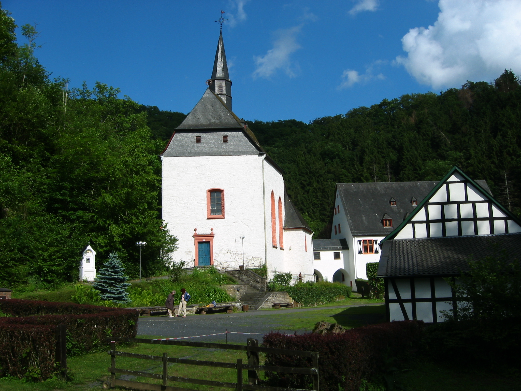 Pfarrkirche in Ehrenstein, rechts Kloster, im Vordergrund Scheune